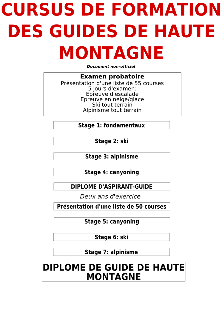 Schéma du cursus des guides de haute montagne. Fichier non-officiel.